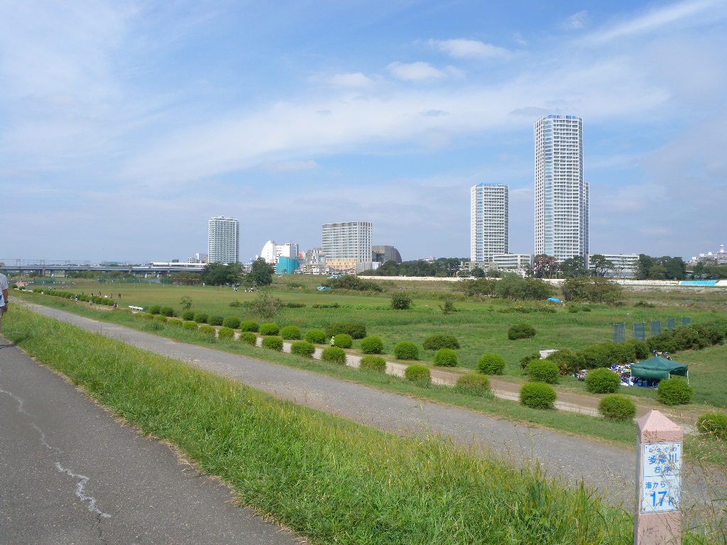 多摩川海岸より17km・諏訪２丁目・二子玉川を望む